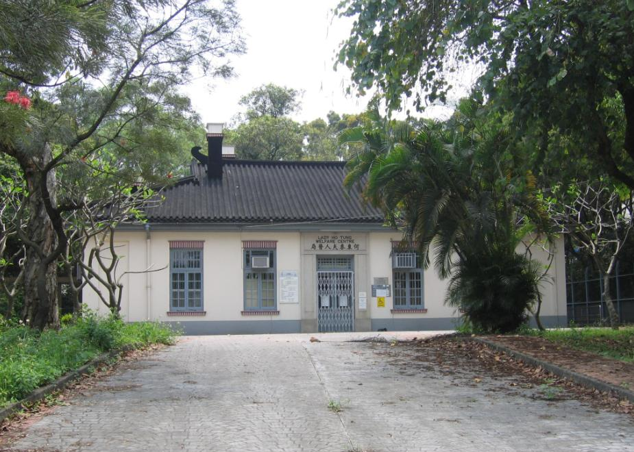 何東夫人醫局